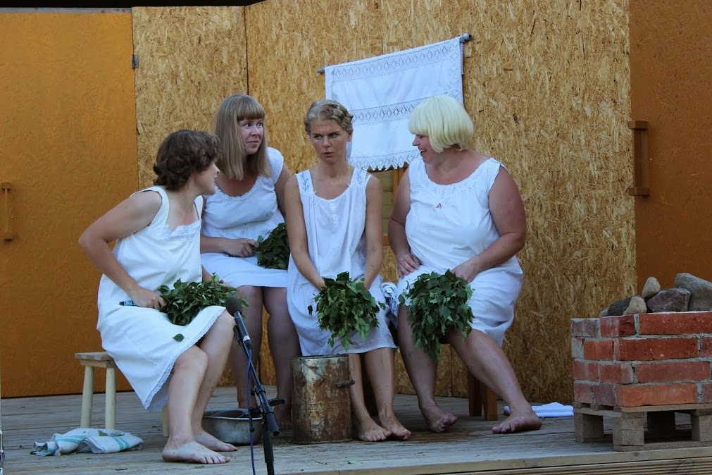 Ingrid Ulsti lavastus "Asenaine"